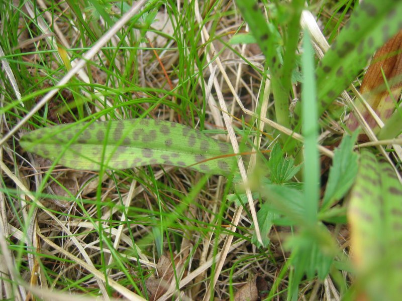 Geflecktes Knabenkraut Dactylorhiza maculata, Zingst